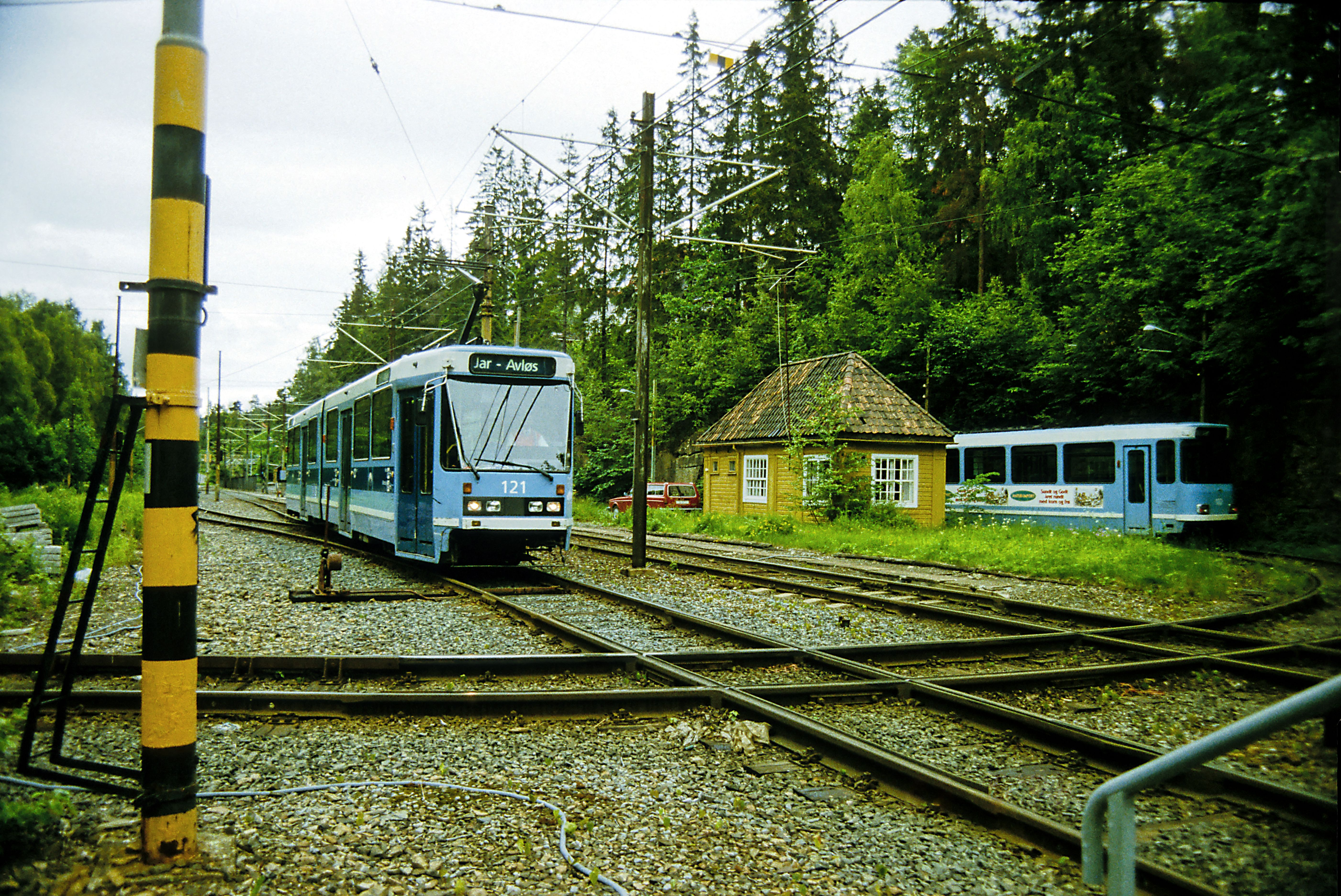 Planmäíg enden die meisten Züge der Linie 10 hier, wie kehren in der Wendeschleife. Einige Züge verkehrten auf der Gemeinschaftsstrecke bis zum Bw Avløs. Zum Aufnahmezeitpunkt war das Westnetz abgesehen von der Strecke zum Sognsvann vollständig mit Fahrleitung ausgerüstet.